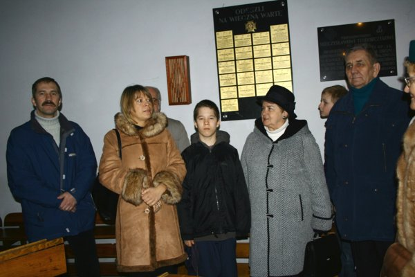 Uroczystość odsłonięcia tablic pamiątkowych poświęconych seniorom włocławskiego ZHP. Włocławek - kościół pw. Najświętszego Zbawiciela - 26 marca 2006 r.